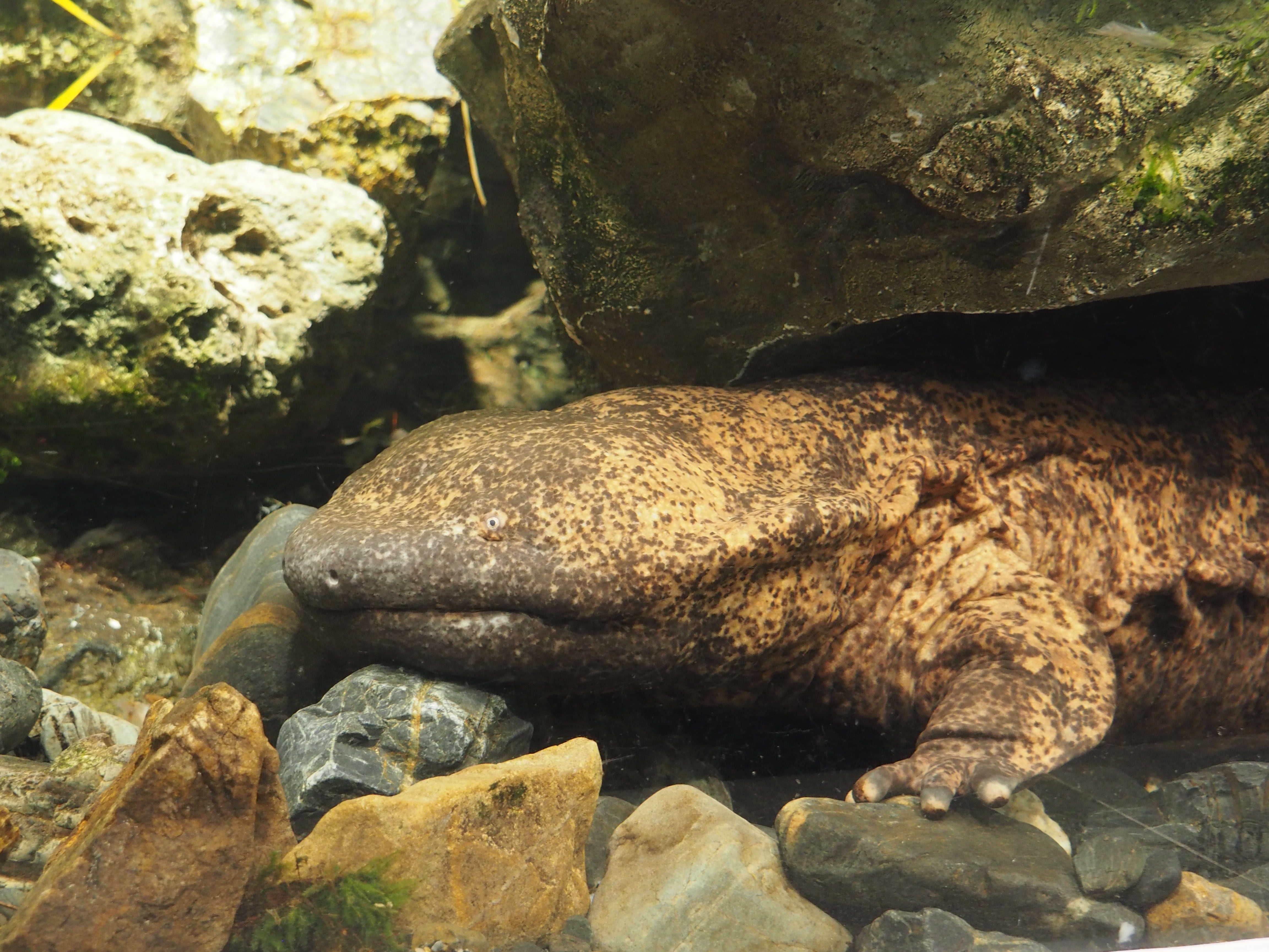 Kyoto Aquarium